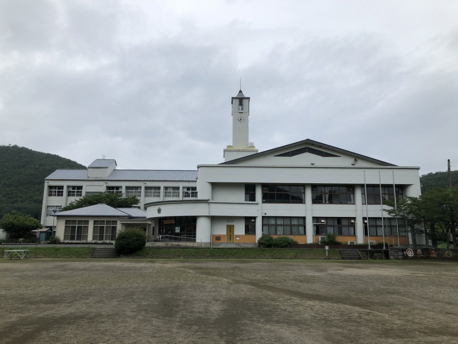 南丹市立川辺小学校の校舎